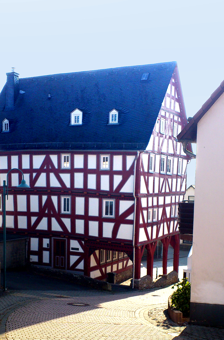 Museum bzw. Alte Schule in Herborn-Seelbach (Germany)